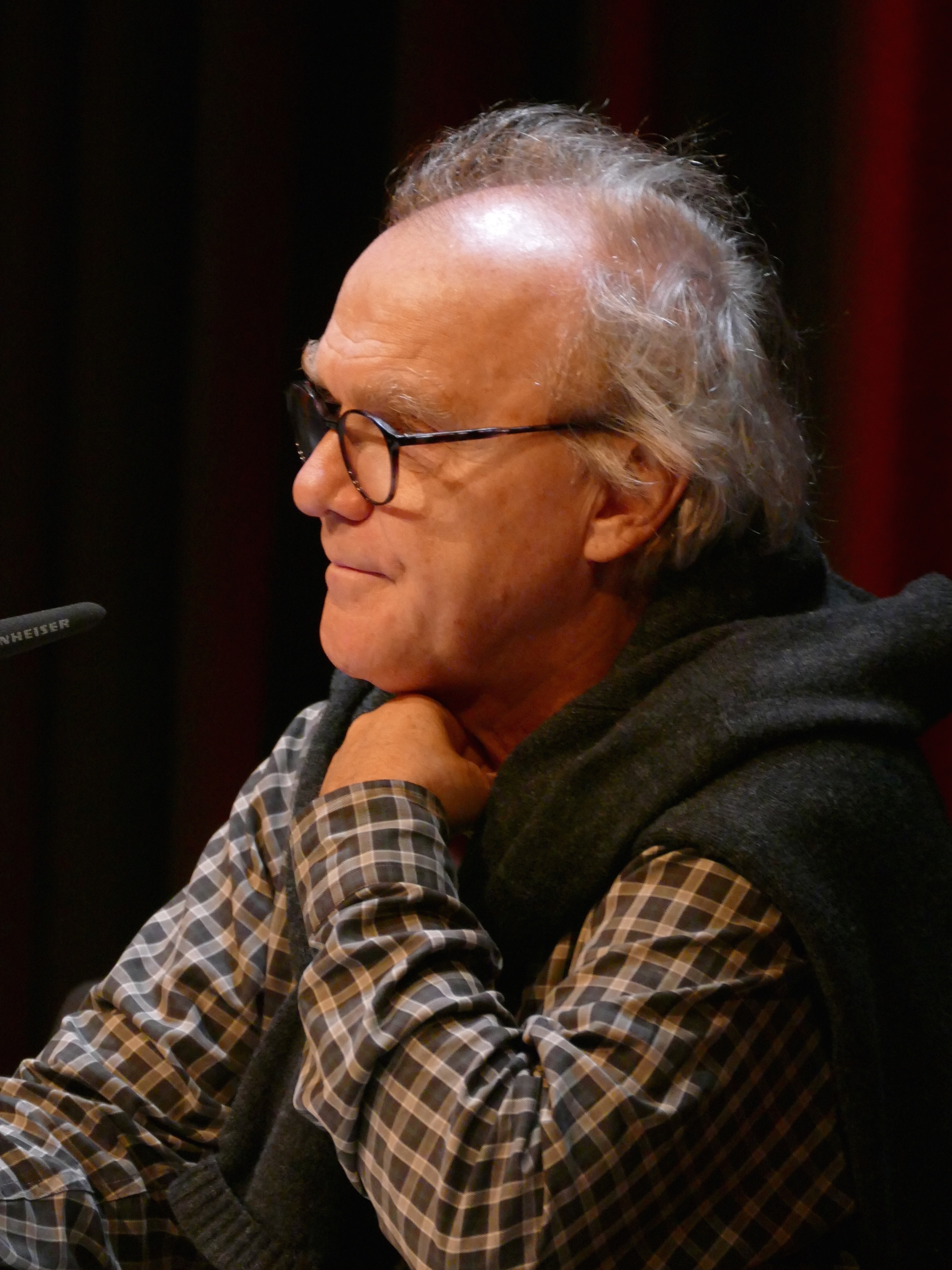 Michael Köhlmeier stellt seine Novelle "Der Mann, der Verlorenes wiederfindet" auf dem Literaturfest München 2017 vor. Ort: Black Box, Gasteig.